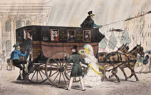 Pariser Kutsche. Lithographie von Gihaut frères nach Loeillot Hartwig, um 1850.